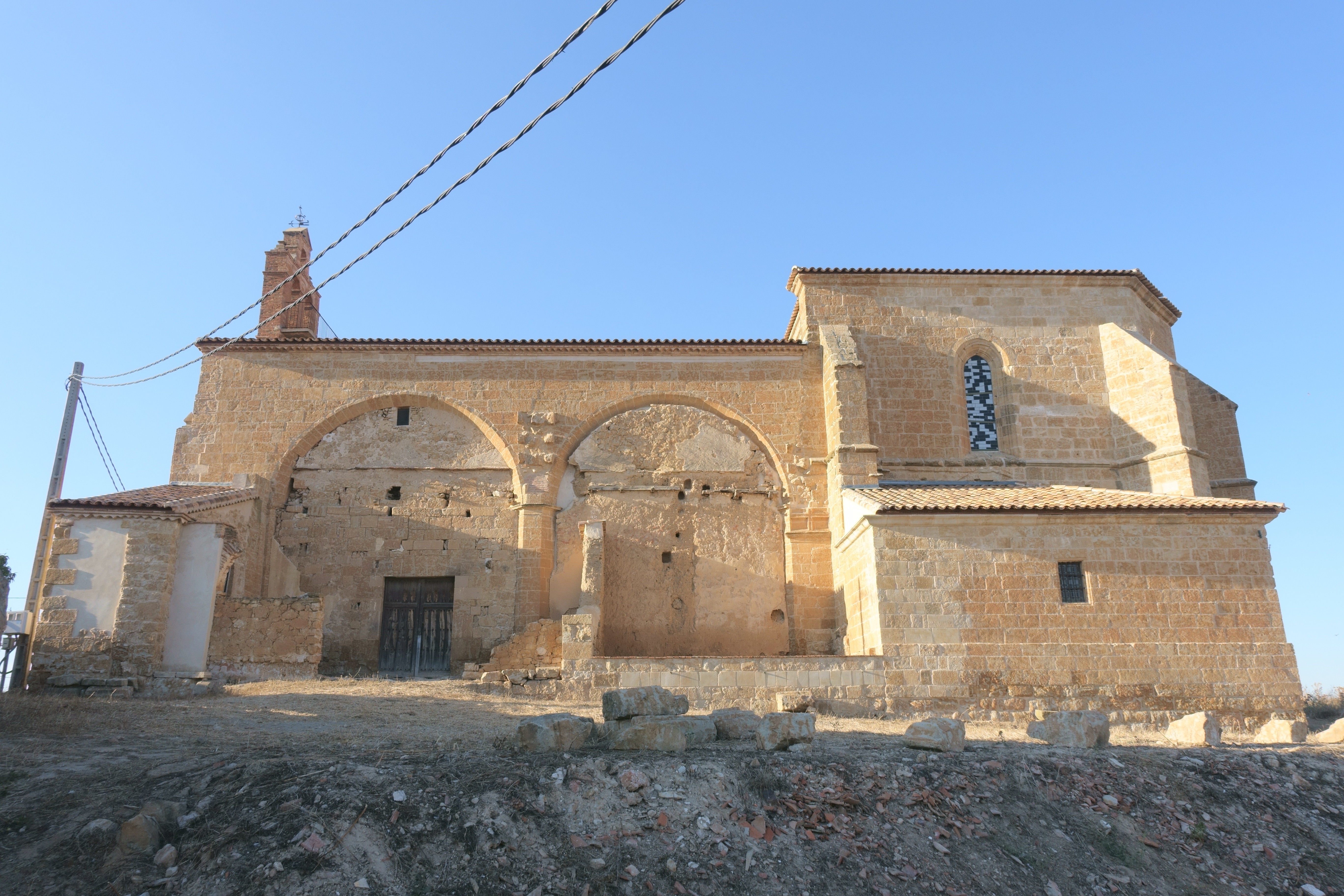 Iglesia de la Asunción de Nuestra Señora, Valdefinjas (Zamora, España).